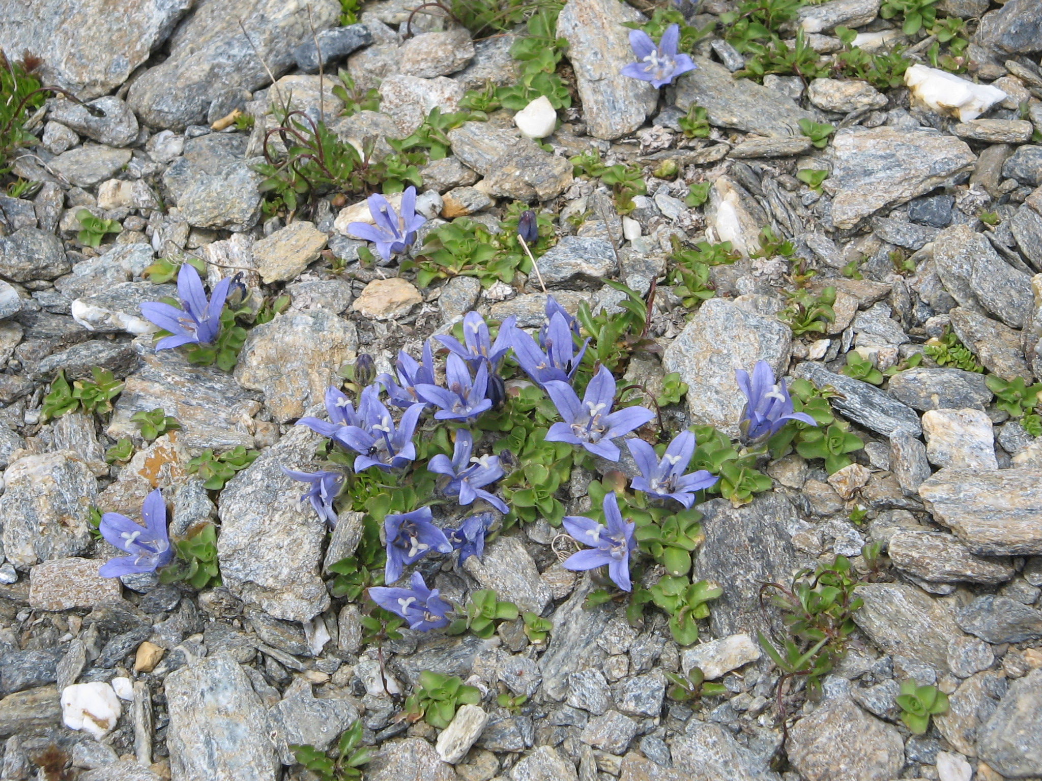 Campanula cenisia dans la Vanoise